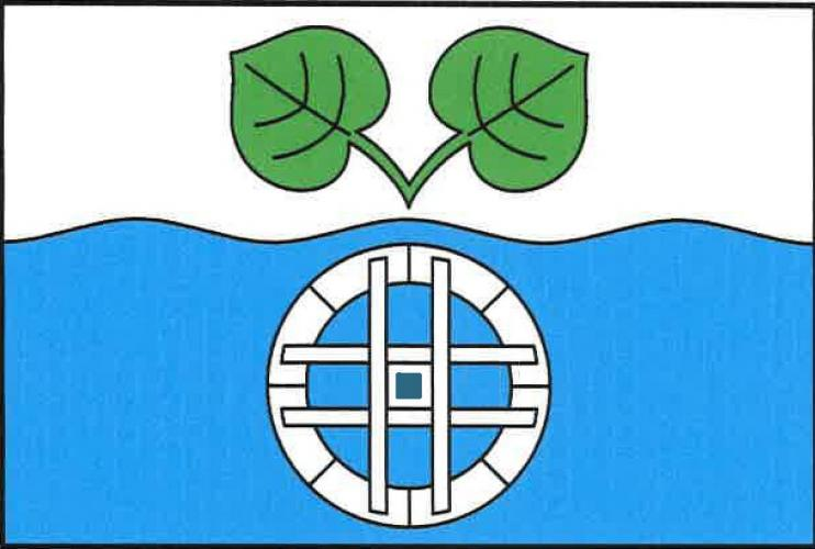 Trotina vlajka